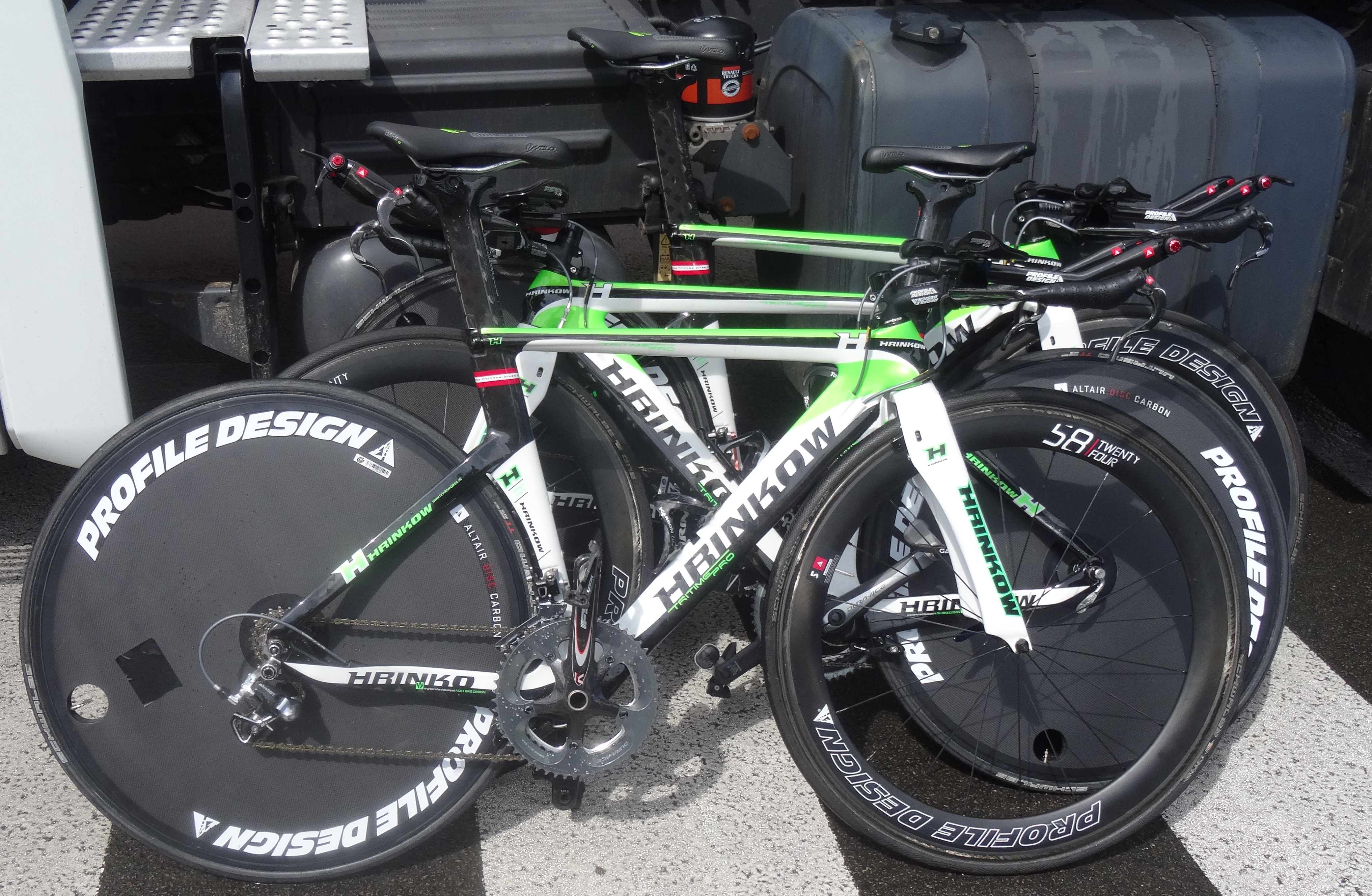 Reportage photographique réalisé le vendredi 23 mai 2014 à l'occasion du départ de la première étape du Paris-Arras Tour 2014 à Lens, Pas-de-Calais, Nord-Pas-de-Calais, France. Depicted team: Vorarlberg